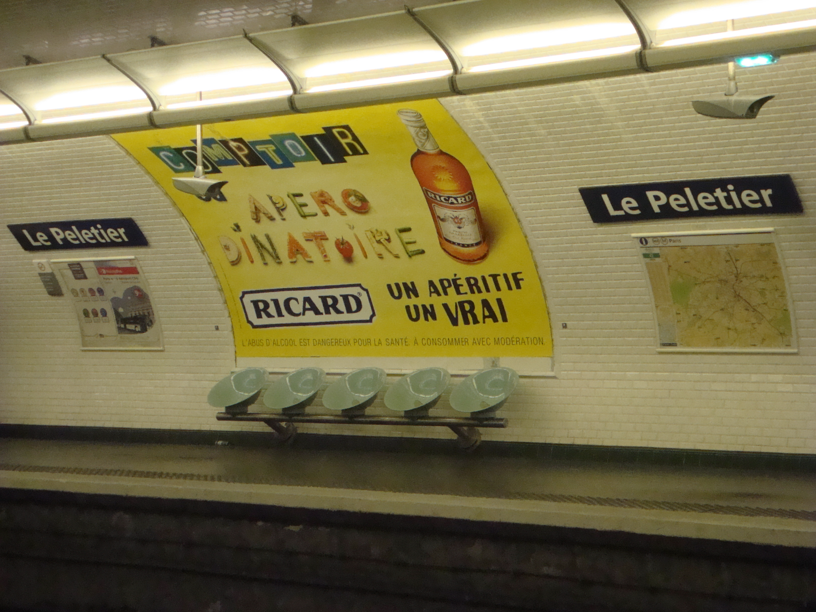 Quais de la station Le Peletier sur la ligne 7 du métro de Paris